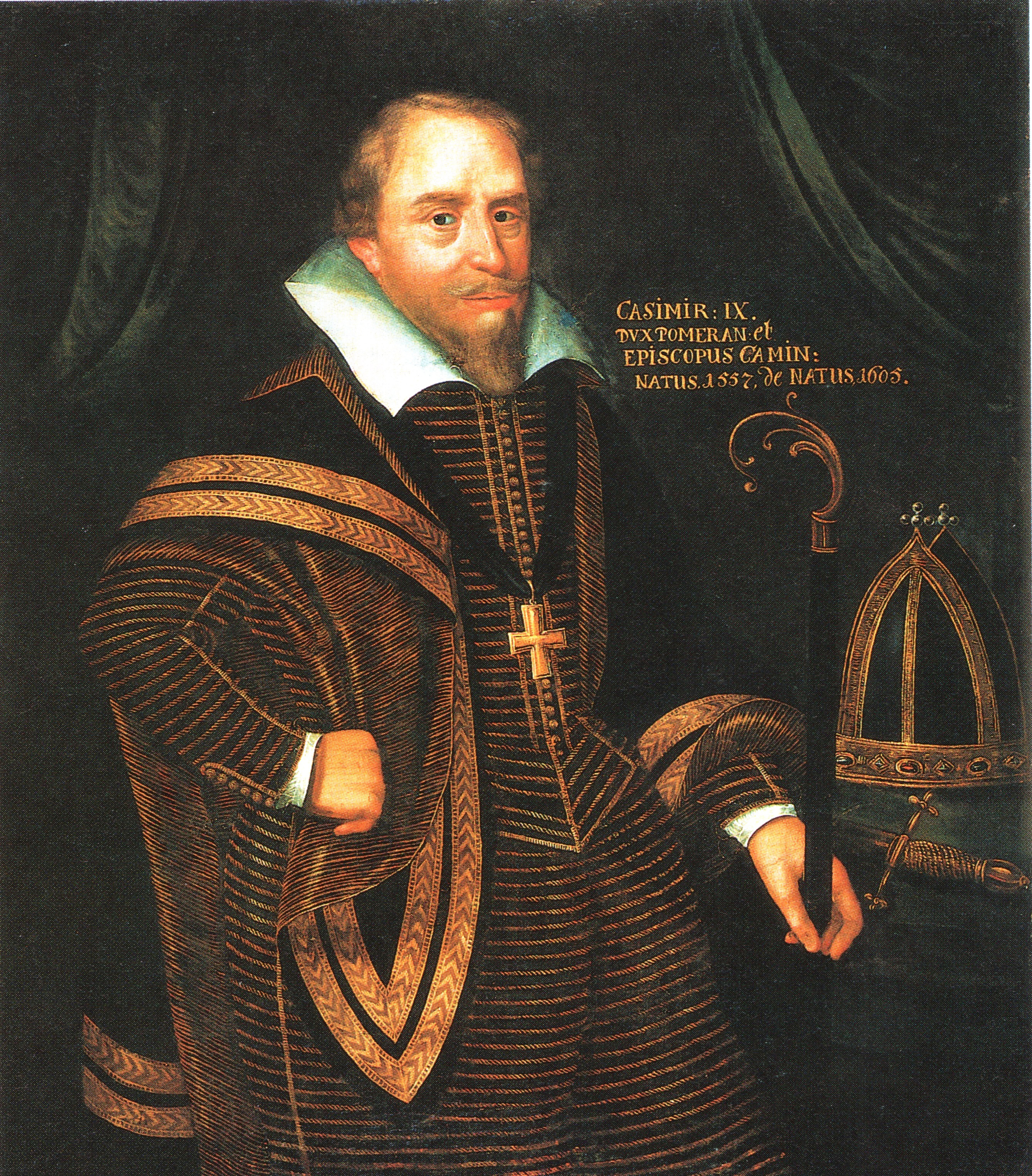 Ölgemälde von Ulrich von Pommern (auf der Inschrift fälschlich als Kasimir IX. bezeichnet)